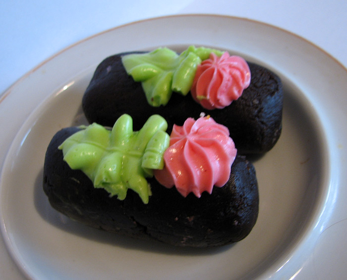 Пирожное "Картошка".